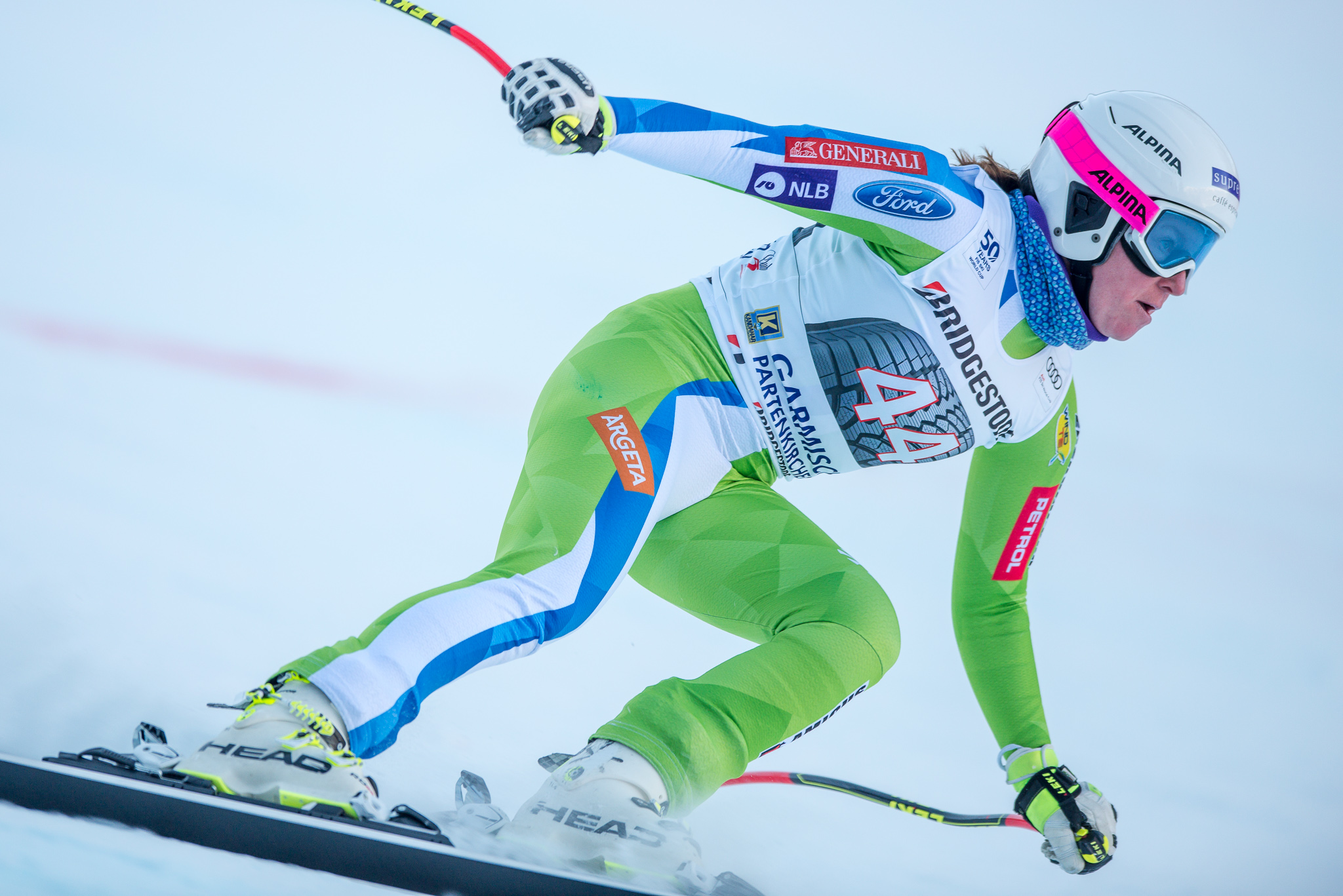 64. Kandahar Rennen,Audi FIS Ski Weltcup Garmisch-Partenkirchen,Damen Abfahrt,Kandahar,Ladies Downhill,Marusa Ferk,Maruša Ferk